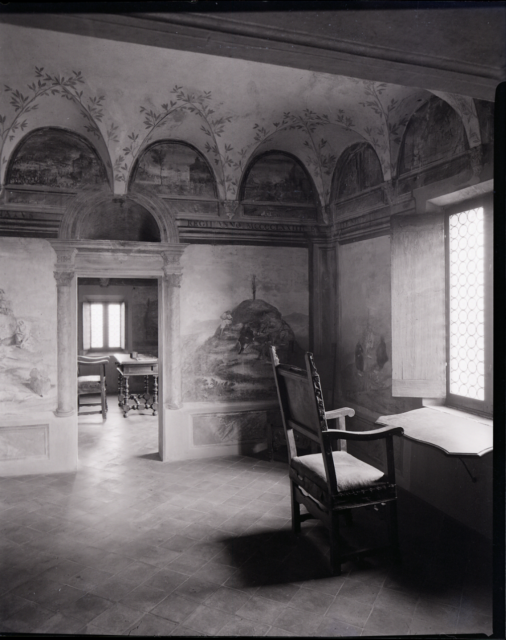 Servizio fotografico : Scandiano, 1965 / Paolo Monti. - Buste: 4, Fototipi: 3 : Negativo b/n, gelatina bromuro d'argento/ pellicola ; 10x12. - ((Serie costituita da 3 negativi identificati con i nn.: 12157-12159. La suddetta serie è contenuta nella scatola identificata con la numerazione 12001-12500G. La busta 12160 è vuota e riporta manoscritto: "Ceduto doppia". - Occasione: Documentazione per la pubblicazione: Emilio CECCHI, Natalino SAPEGNO (a cura di), Storia della Letteratura Italiana, 9 voll., Milano, Garzanti, 1966 e segg. - Fonte: Agenda di Paolo Monti: R 1 - Monti/ 1 aprile 1963 - 6 giugno 1964/ 6000-8193 (1963-1964), presso Archivio Paolo Monti